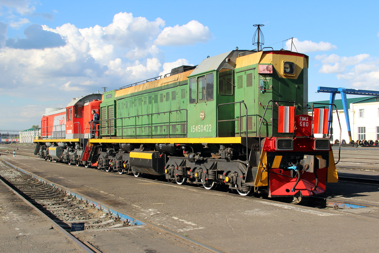 КР 04.2001 г.